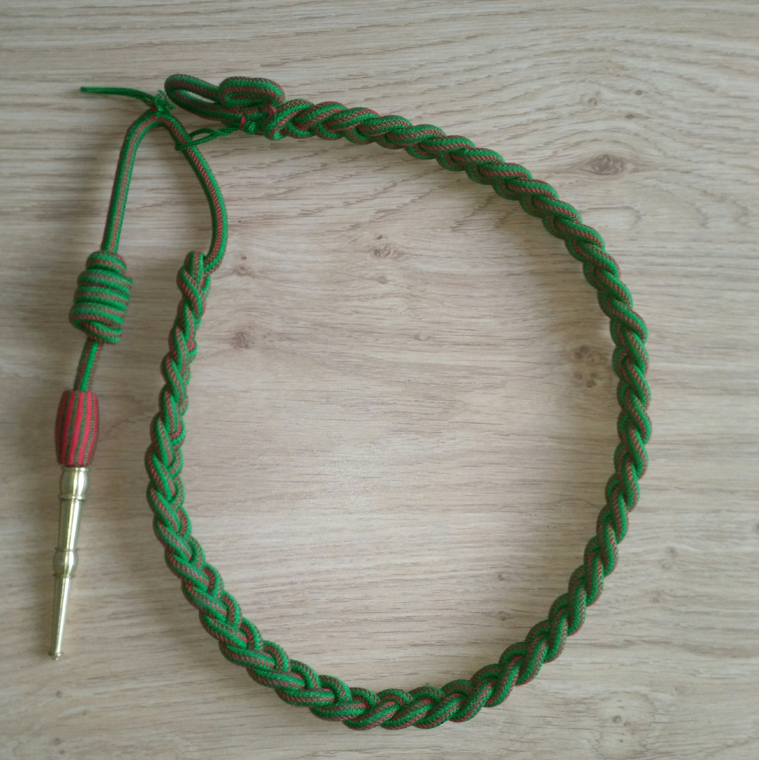 Photographie d'une fourragère de la croix de guerre 39-45, propriété de l'auteur.